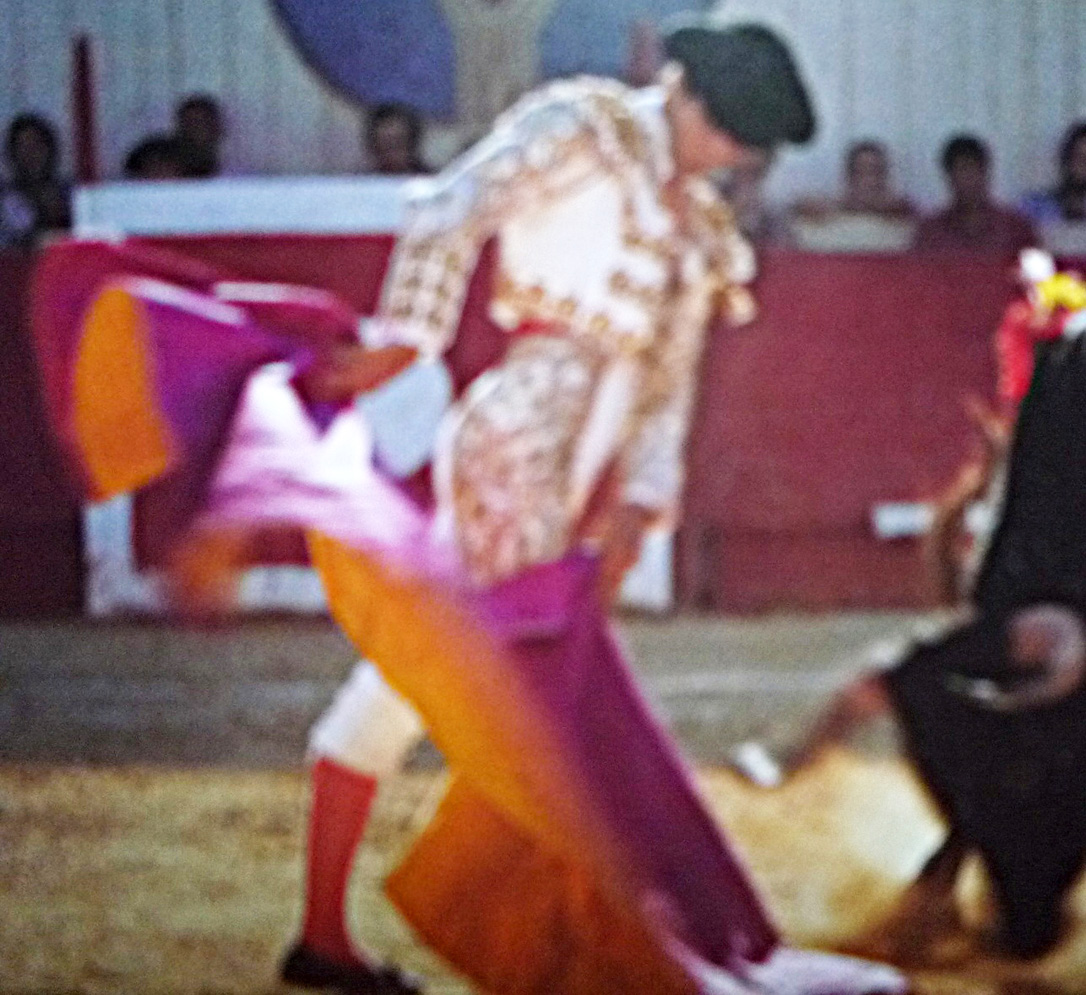 Demiveronique2++.JPG